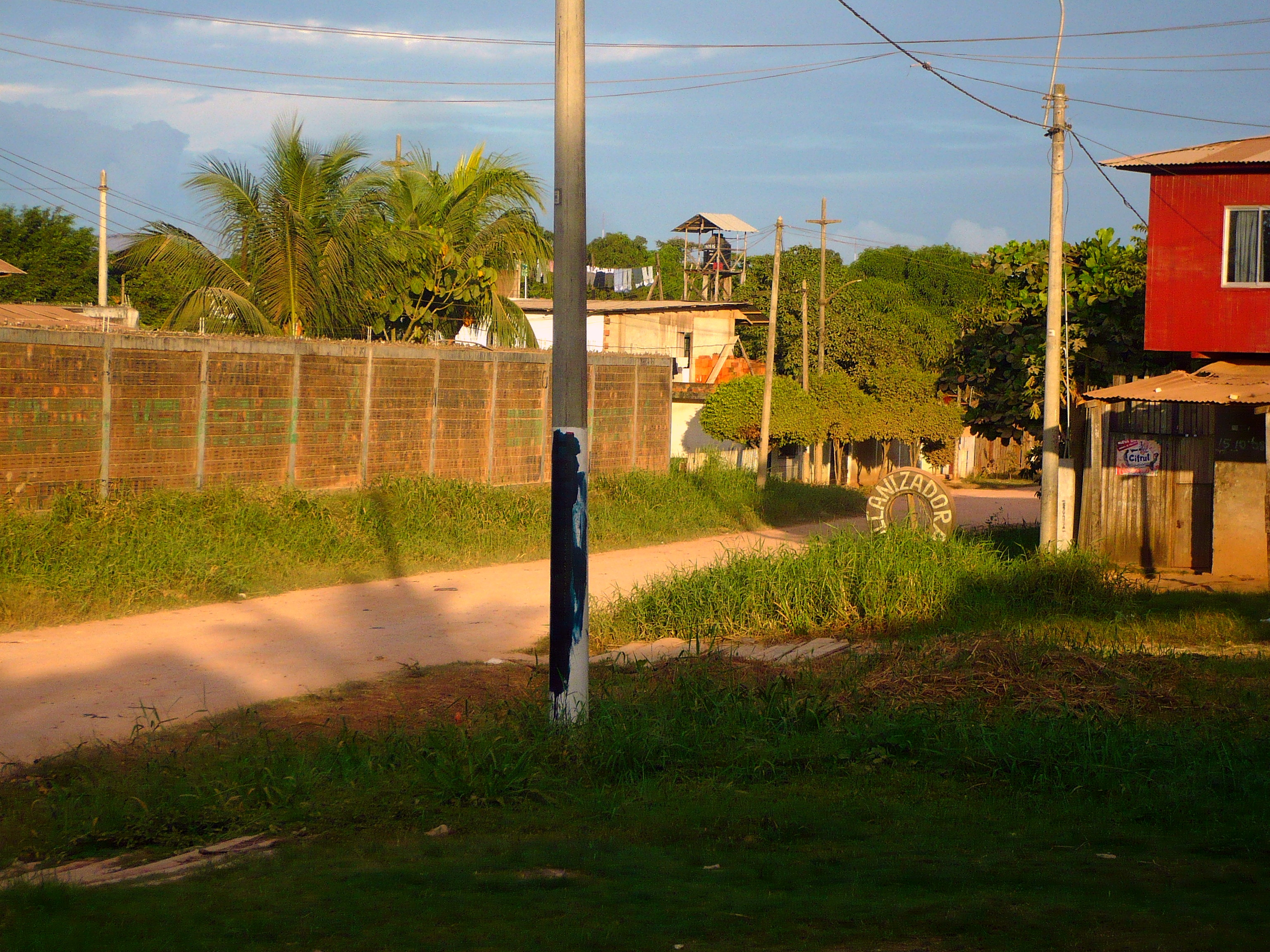 La carretera hacia Puerto Callao, a medio de dos cuadras de las avenidas Amazonas y Unión.